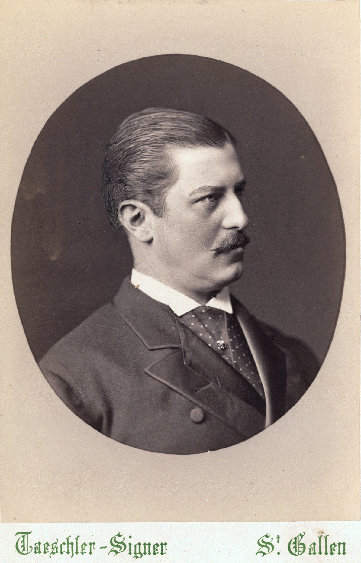 Frédéric de Hohenzollern-Sigmaringen (1843-1904)